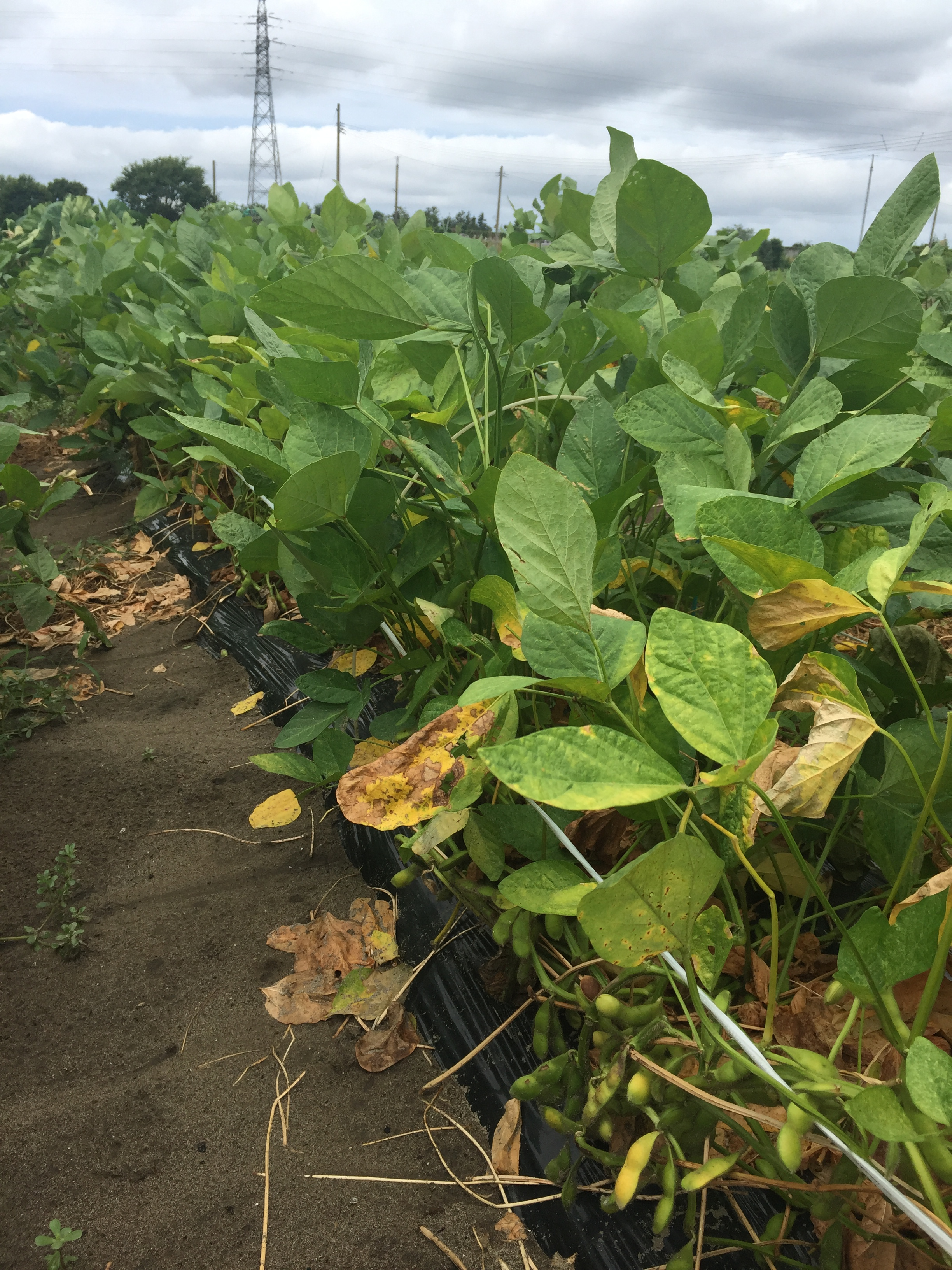 くろさき茶豆。家の畑のものを撮影。